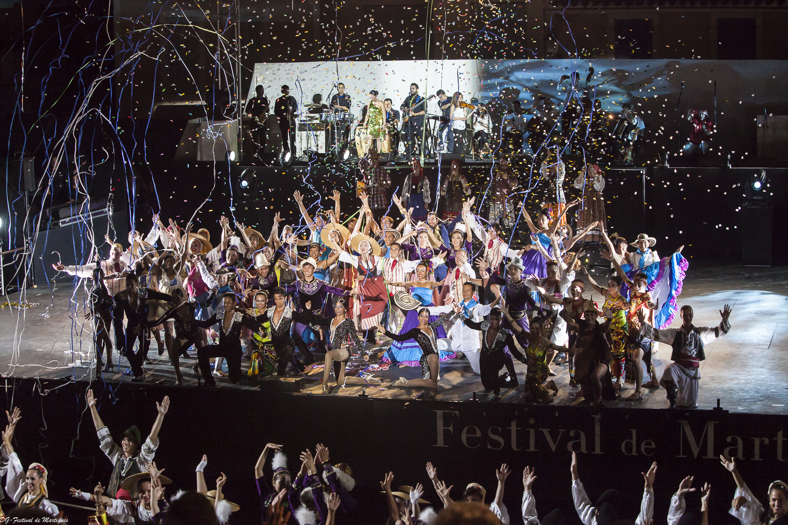 Tableau final avec tous les ensembles venus des 4 coins du monde lors de la création inédite pour le spectacle de clôture du festival de Martigues, édition 2015